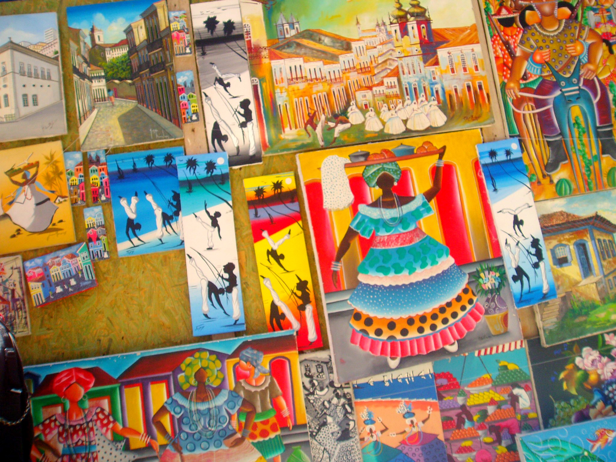 Afro-Brazilian Art